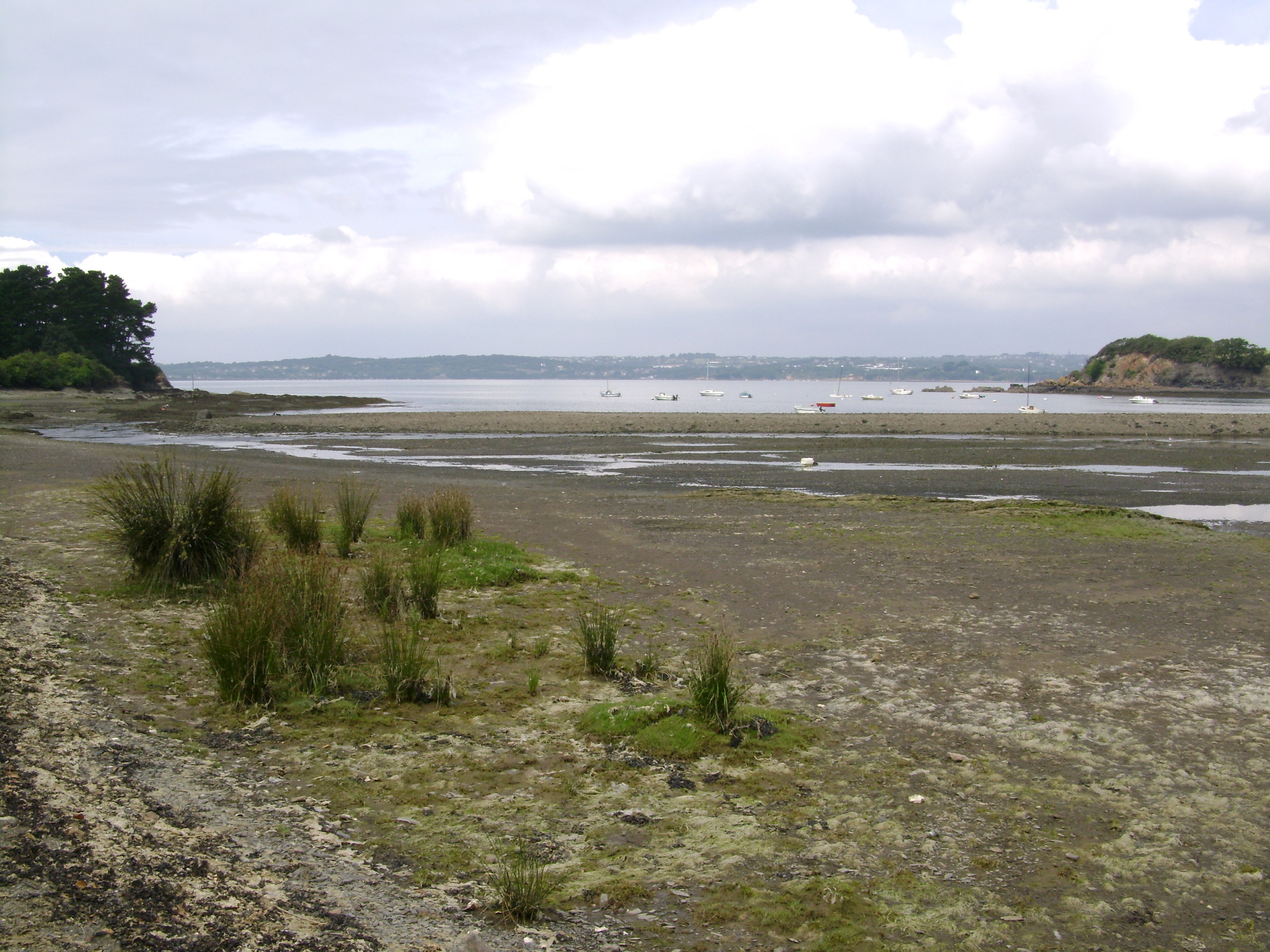 Logonna-Daoulas, le sillon du Roz